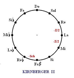 Tempérament de Kirnberger II